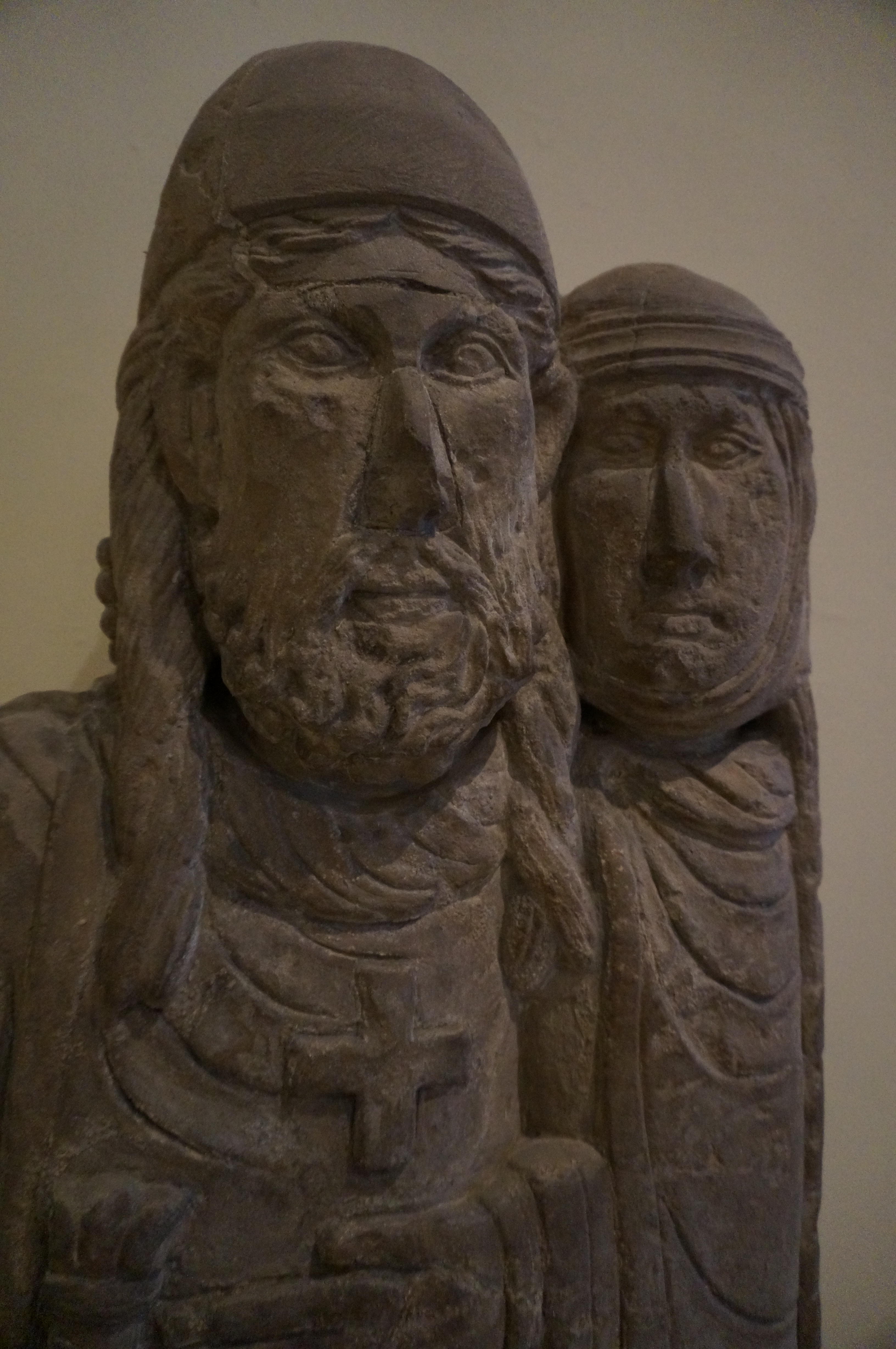 Sculptures présentées au Musée Lorrain .